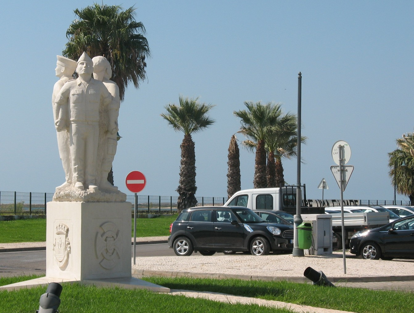 Памятник военным трех родов войск Португалии на побережье Фару